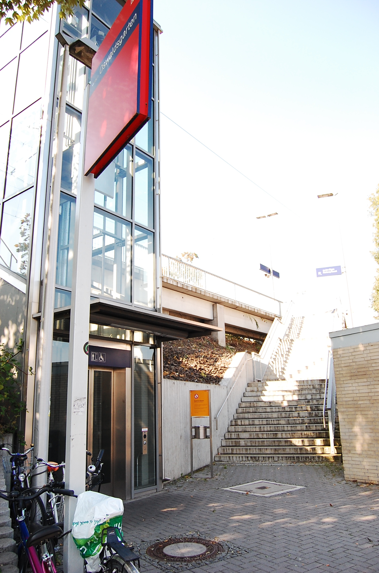 Zughaltestelle Oswaldsgarten Gießen, selbst fotografiert